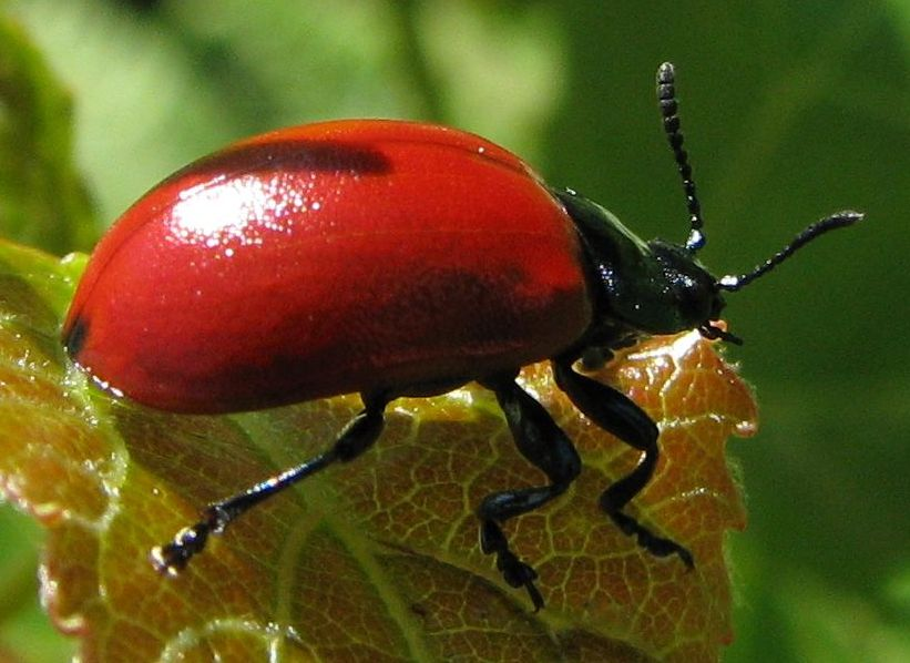 Rød poppelbladbille Chrysomela populi har en liten svart prikk bakerst